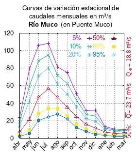 Curvas de variación estacional del río Muco en Puente Muco. # Dirección General de Aguas # Diagnóstico y clasificación de los cursos y cuerpos de agua según objetivos de calidad. Cuenca del río Imperial. # Santiago de Chile # Ministerio de Obras Públicas (Chile) # 2004 # url: # urlarchivo: # Tabla 4.10: Río Muco en puente Muco (m3/s), pág.55 mes 5% 10% 20% 50% 85% 95% abr 24.003 18.535 13.552 7.449 3.565 2.312 may 79.017 59.708 42.419 21.808 9.211 5.302 jun 106.033 88.522 71.143 46.831 27.984 20.684 jul 108.256 94.946 80.237 56.34 34.127 24.426 ago 81.373 71.865 61.953 46.982 33.683 27.648 sep 75.11 62.286 50.369 35.33 25.316 21.948 oct 50.698 43.504 36.096 25.135 15.881 12.004 nov 31.396 26.984 22.46 15.817 10.27 7.969 dic 31.964 25.562 19.5 11.619 6.141 4.223 ene 13.532 11.747 9.886 7.075 4.578 3.445 feb 10.615 9.164 7.652 5.368 3.339 2.418 mar 9.915 8.453 6.968 4.817 3.057 2.34 This plot was created with Gnuplot.